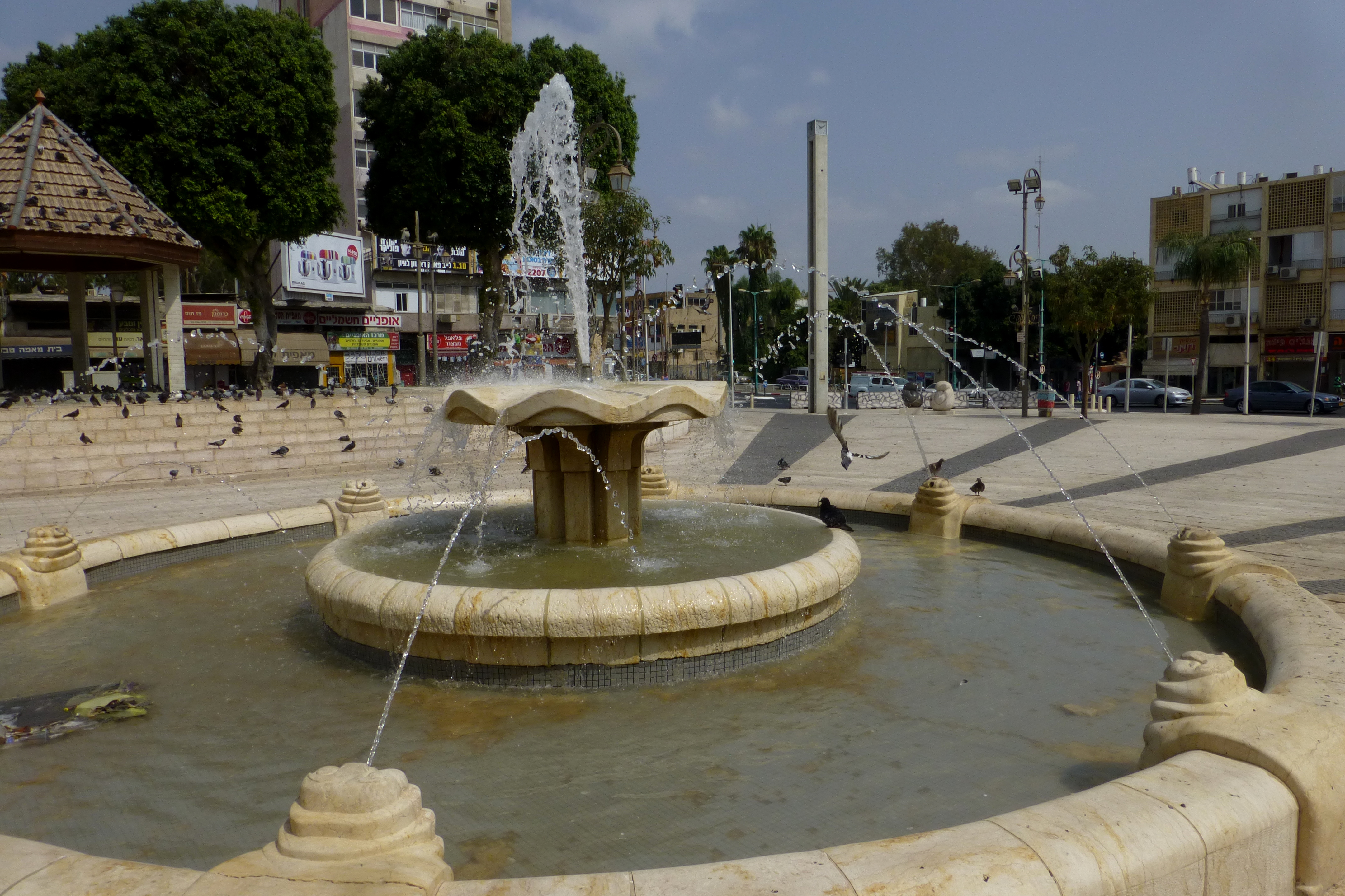 כיכר המייסדים, כיכר מרכזית בפתח תקווה, שוכנת במיקום הבתים הראשונים שנבנו בפתח תקווה בשנת 1878. כבר בימי העלייה השנייה שימשה כמקום מפגש ובילויים.